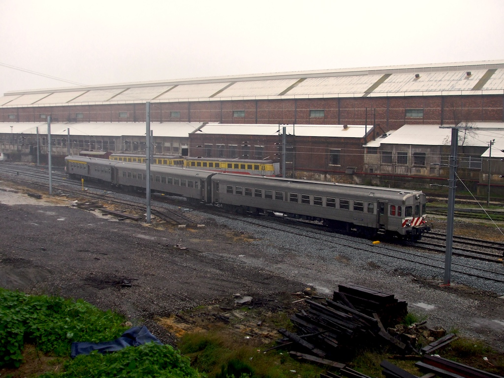 no último dia de serviço neste eixo urbano. Tipo: Comboio Urbano 17266 [Praias do Sado-A - Barreiro] Local: Barreiro [Linha do Alentejo, PK 1] Data e hora: 13 de Dezembro de 2008 [12h17] Material: Automotora 0651 [Unidade Tripla Diesel]